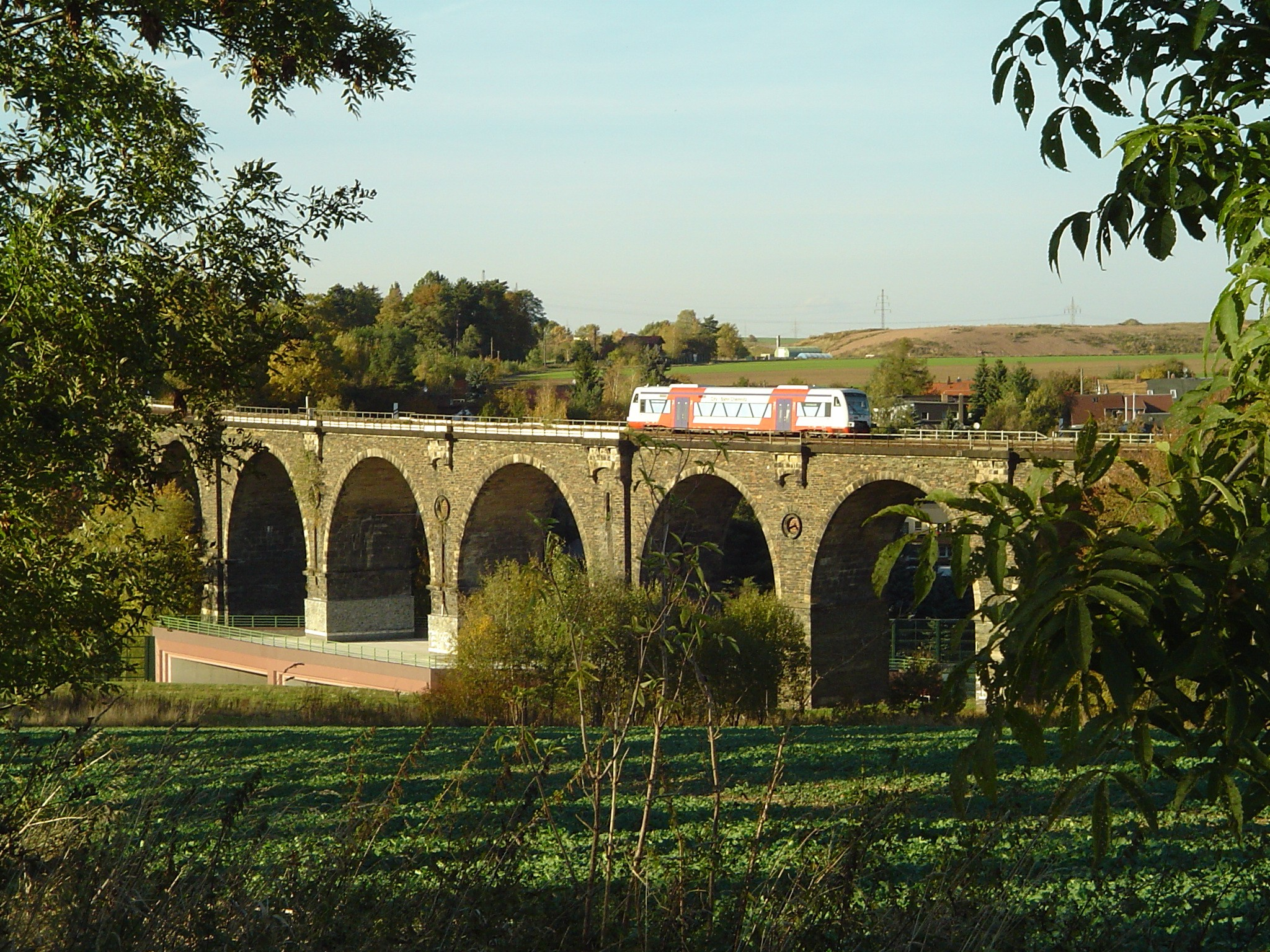 Bahrebachmühlenviadukt mit Citybahn